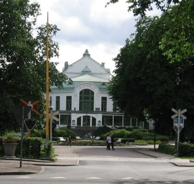 Kristianstad Teater